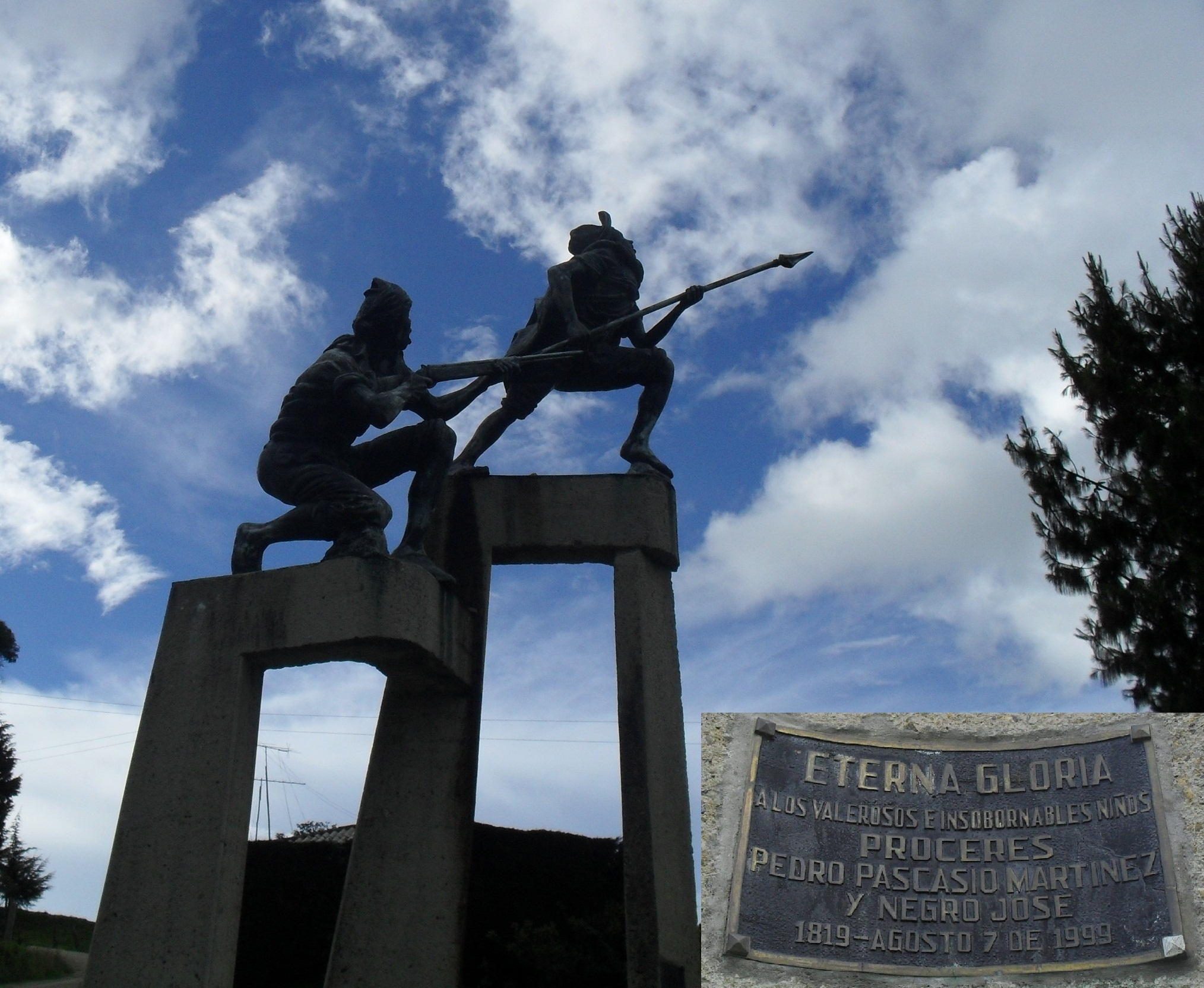 Monumento dedicado a Pedro Pascasio Martinez y a Negro José en inmediaciones al puente de Boyacá (homenaje por la captura del comandante español Jose Maria Barreiro después de la Batalla de Boyacá, el día 07 de agosto de 1819)